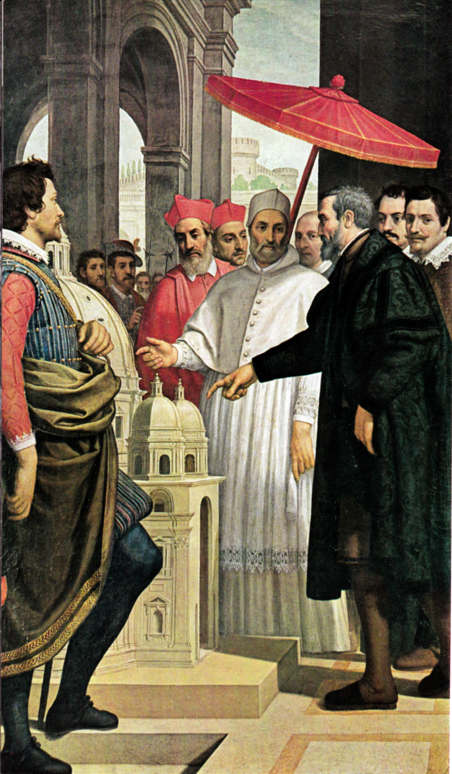 Passignano, michelangelo presenta a paolo IV il modellino per san pietro.jpg